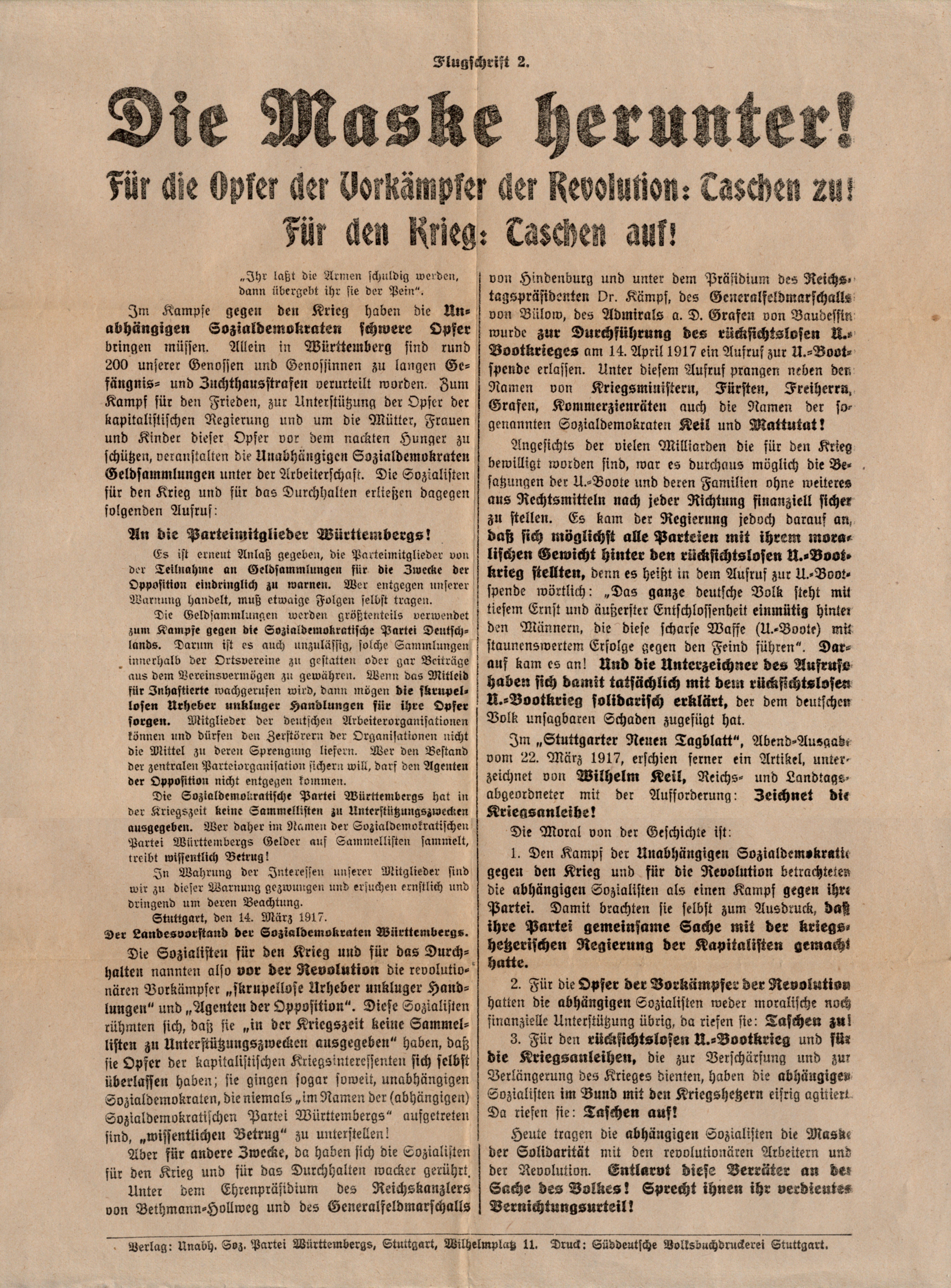 „Flugschrift 2. Die Maske herunter! Für die Opfer der Vorkämpfer der Revolution: Taschen zu! Für den Krieg: Taschen auf!“, Flugblatt der USPD Württemberg, Stuttgart Titel entspricht Archivalie E 135 b Bü 398 im Hauptstaatsarchiv Stuttgart (Bestand E 135 b: Landesausschuss der Soldatenräte Württembergs), dort aber andere Nr. „Flugschrift 4 'Die Maske herunter!'“, ob Text identisch ist, bleibt zu klären. Dort Datumsangabe: "Dez. 1918(?)".